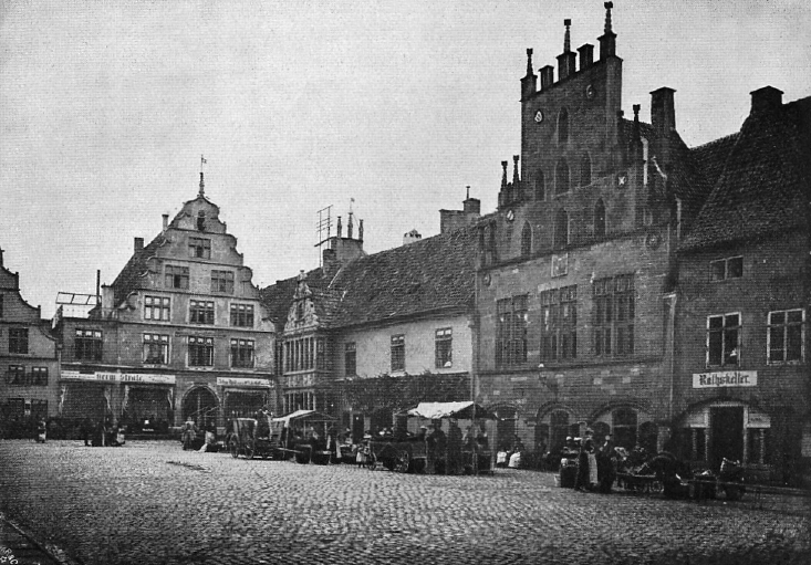 Originalbeschreibung „Marktplatz in Lemgo“. – Lemgo, Kreis Lippe, Nordrhein-Westfalen, Deutschland.